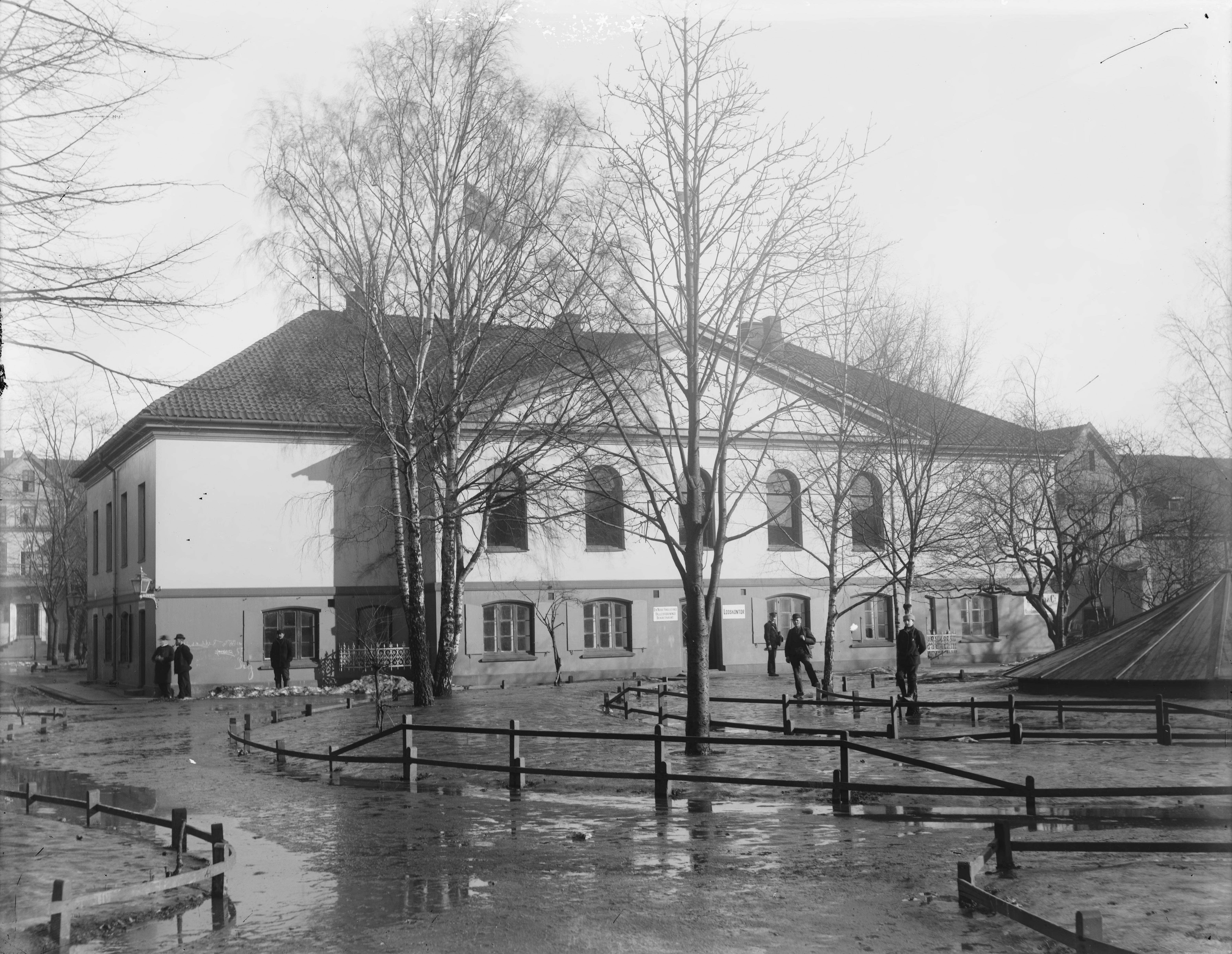 Påskrift negativ: 1. Oslo. Tollbugt. 2 Fot.Skøien [Riksantikvaren] Påskrift konvolutt: B-1 Oslo Tollbugt. 2. Børsen. [Riksantikvaren] Sted: Sentrum Kommune: Oslo Fylke: Oslo Tagger: Oslo børs Børsen fasade hovedstad by